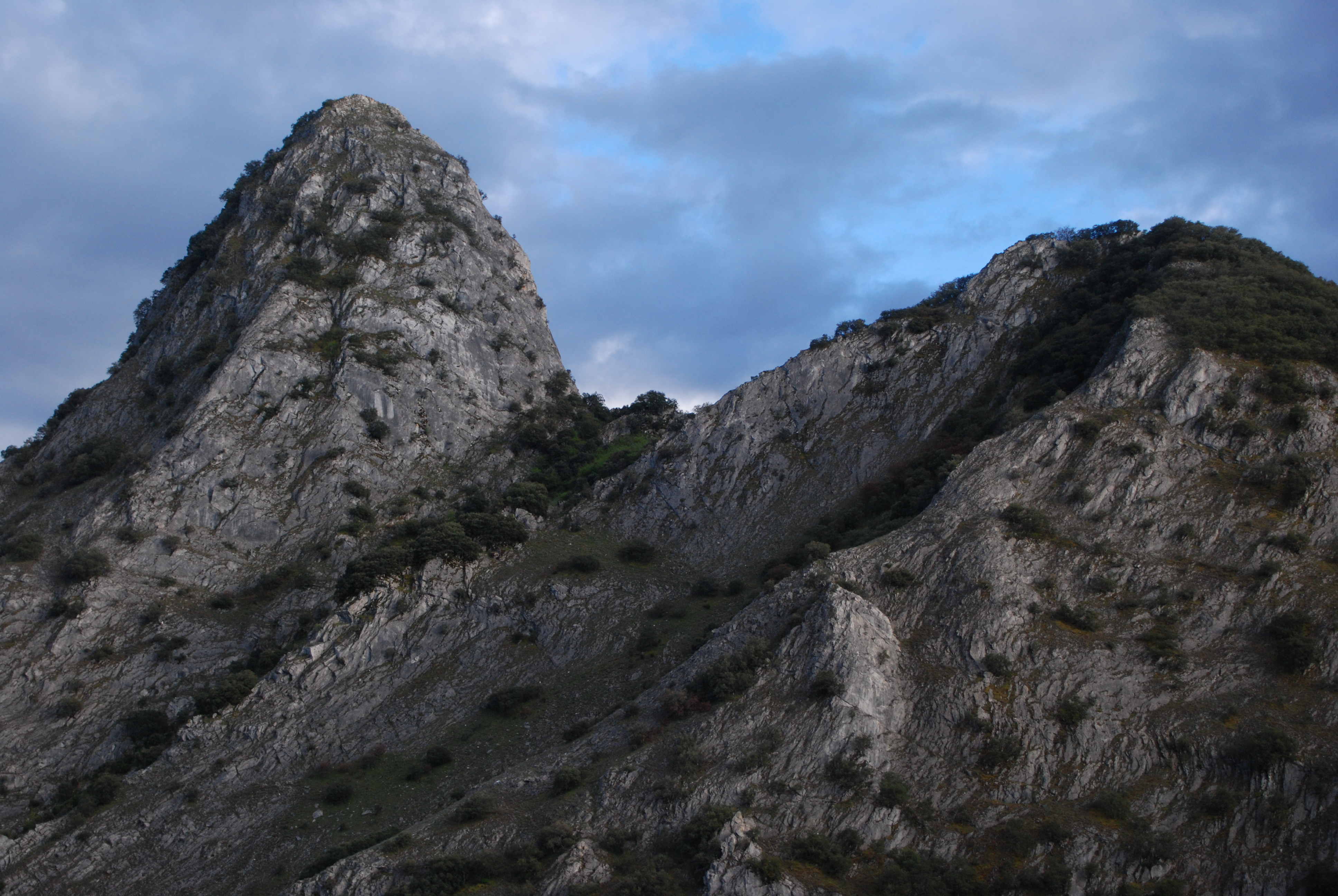 Serra da Enciña da Lastra. Os Penoucos da serra da Lastra. This is a photography of a Special Area of Conservation in Spain with the ID: ES1130009. Natura2000 entry, EEA entry